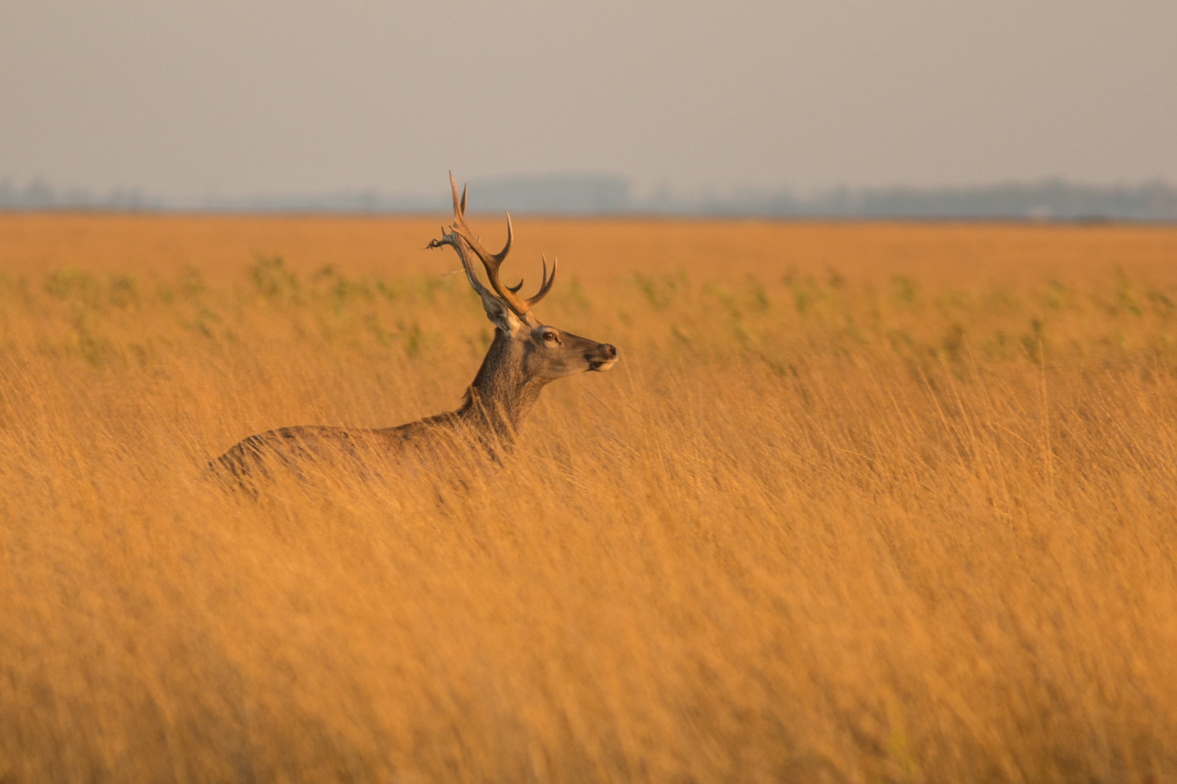 Знято під час експедиції на о. Джарилгач This photo/video of Dzharylhach was taken during Wikiexpedition to Dzharylhach supported by Wikimedia Ukraine. You can see all photographs in category Category:Wikiexpedition to Dzharylhach. English | українська | +/−